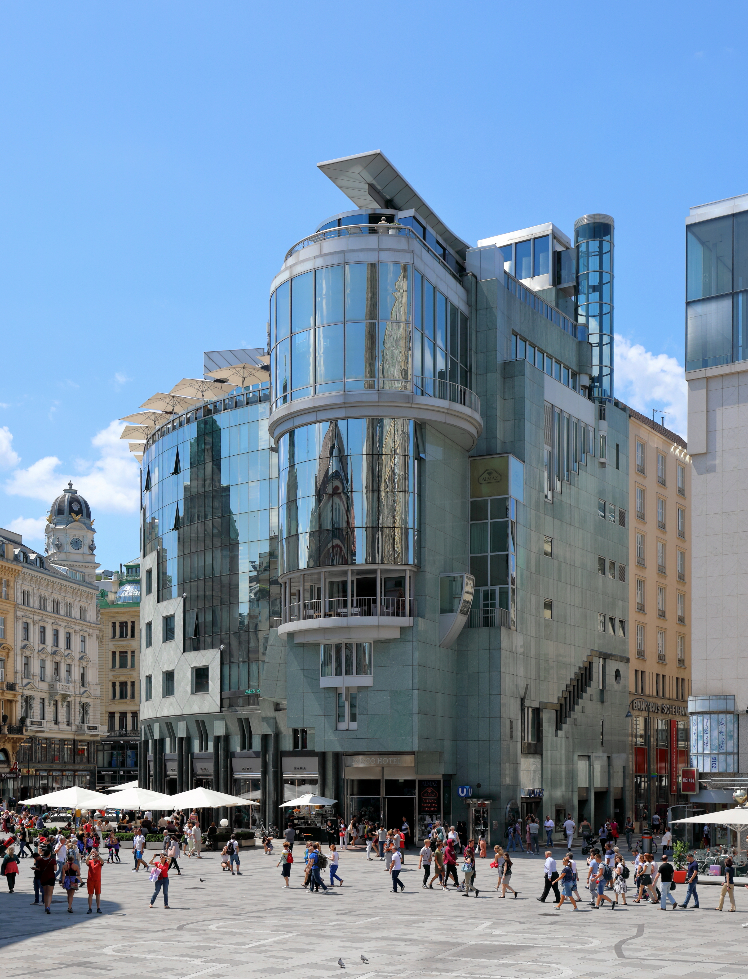 Das Haas-Haus an der Adresse Stock-im-Eisen-Platz 4 (Goldschmiedgasse 1 / Graben 32 / Stephansplatz 12) im 1. Wiener Gemeindebezirk Innere Stadt.Das 1. Haus wurde von 1865 bis 1867 als Warenhaus "Philipp Haas & Söhne" errichtet, im II. WK zerstört und dann abgetragen. Das 2. Haas-Haus wurde von 1951 bis 1953 nach Plänen von Max Fellerer und Carl Appel errichtet und trotz Protesten 1986 abgetragen. Das 3. Haas-Haus, auch als Hollein-Haus bezeichnet, ließen die damaligen Eigentümer (Zentralsparkasse und Kommerzialbank AG sowie Wiener Städtische Wechselseitige Versicherung) trotz heftigen Protesten und Bürgerinitiativen nach Plänen des Architekten Hans Hollein errichten. Die Grundsteinlegung fand im Herbst 1987, die Gleichenfeier am 2. September 1988 und die Eröffnung am 15. September 1990 statt.